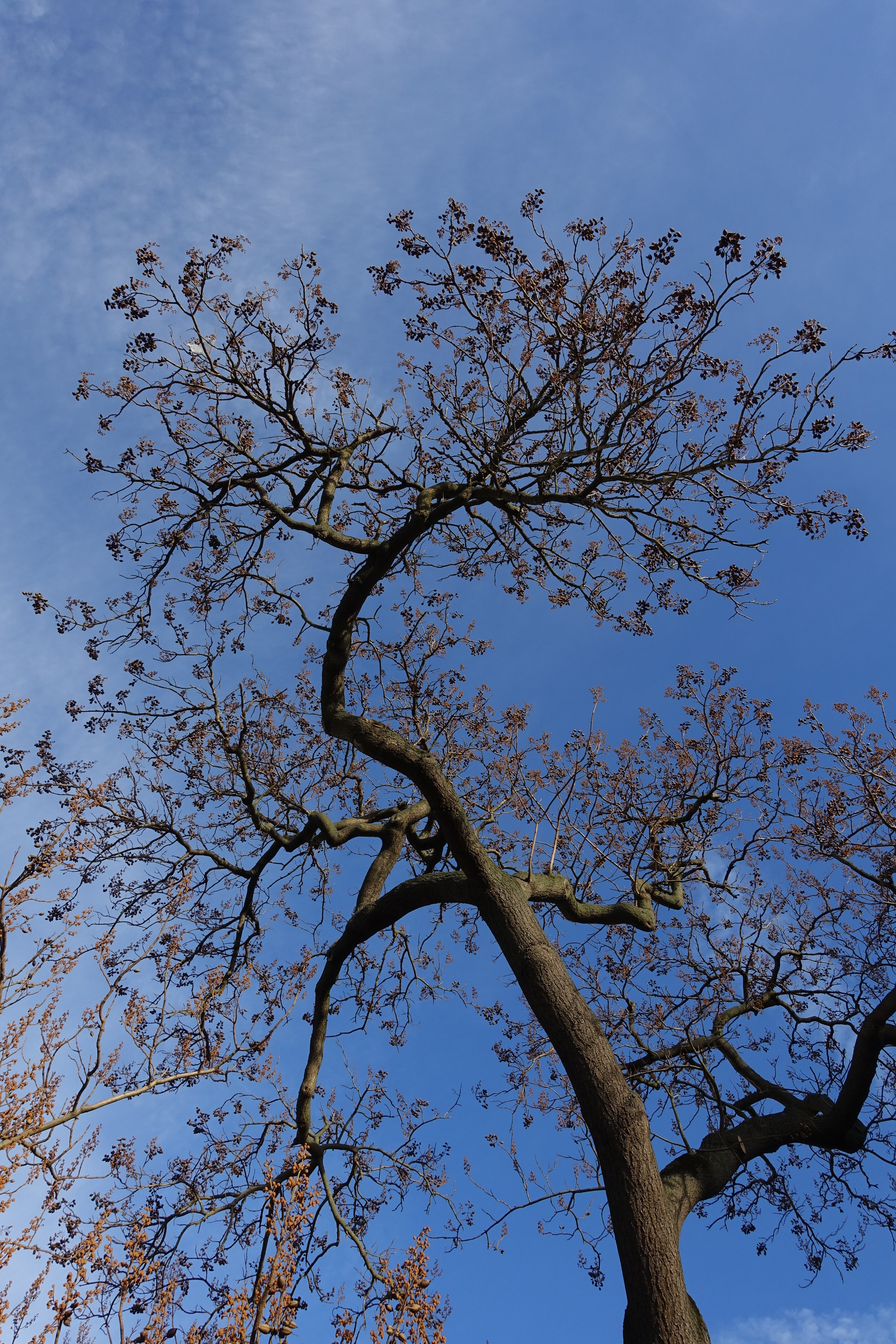 Square Georges Méliès @ Paris